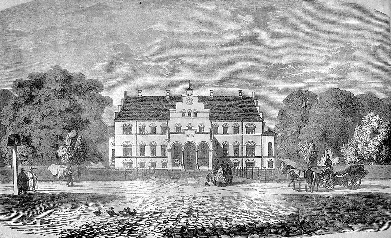 Valbygaard ved Slagelse (Sjælland, Denmark), blev oprettet til hovedgård ved Antvorskov rytterdistrikts salg i året 1774, men gården nævnes i 1310, da den var ejet af Antvorskov Kloster.